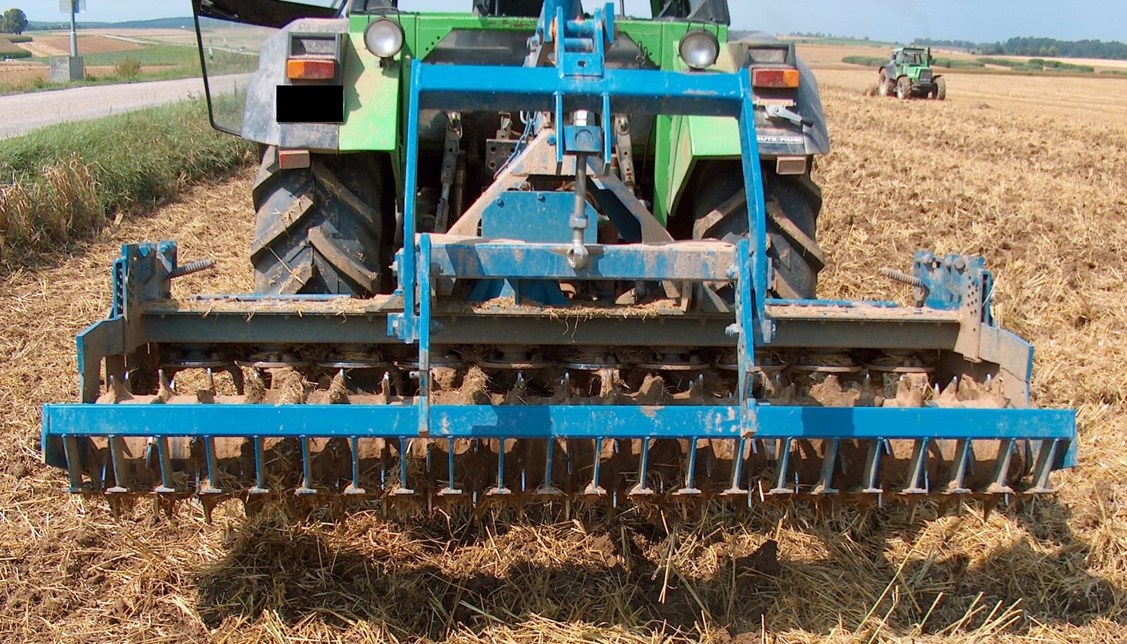 Kreiselegge MKE 250 (mit Nachläuferwalze) der Firma Rabe Agrarsysteme an einem Deutz-Fahr-Traktor